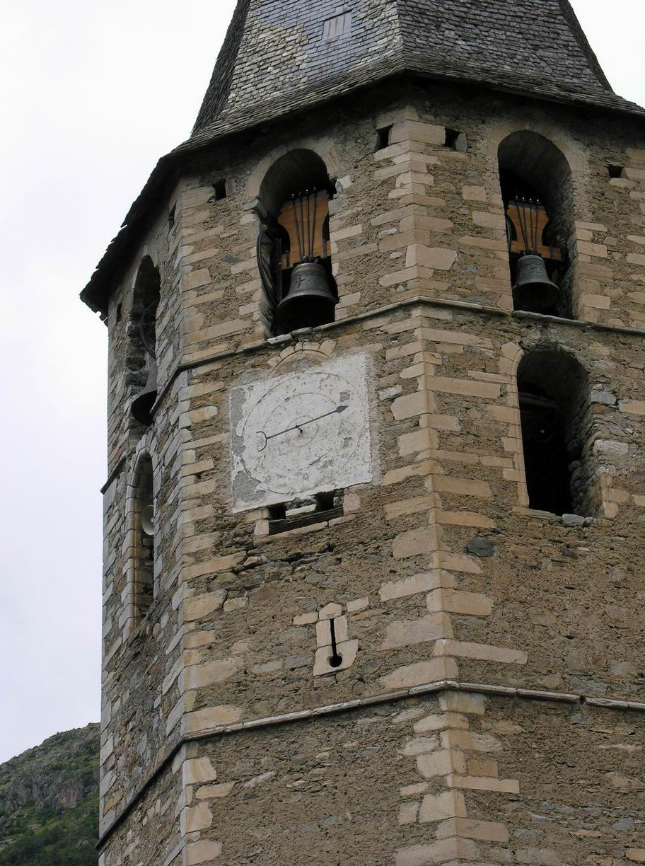 Detall del campanar de Sant Andreu, a Salrdú